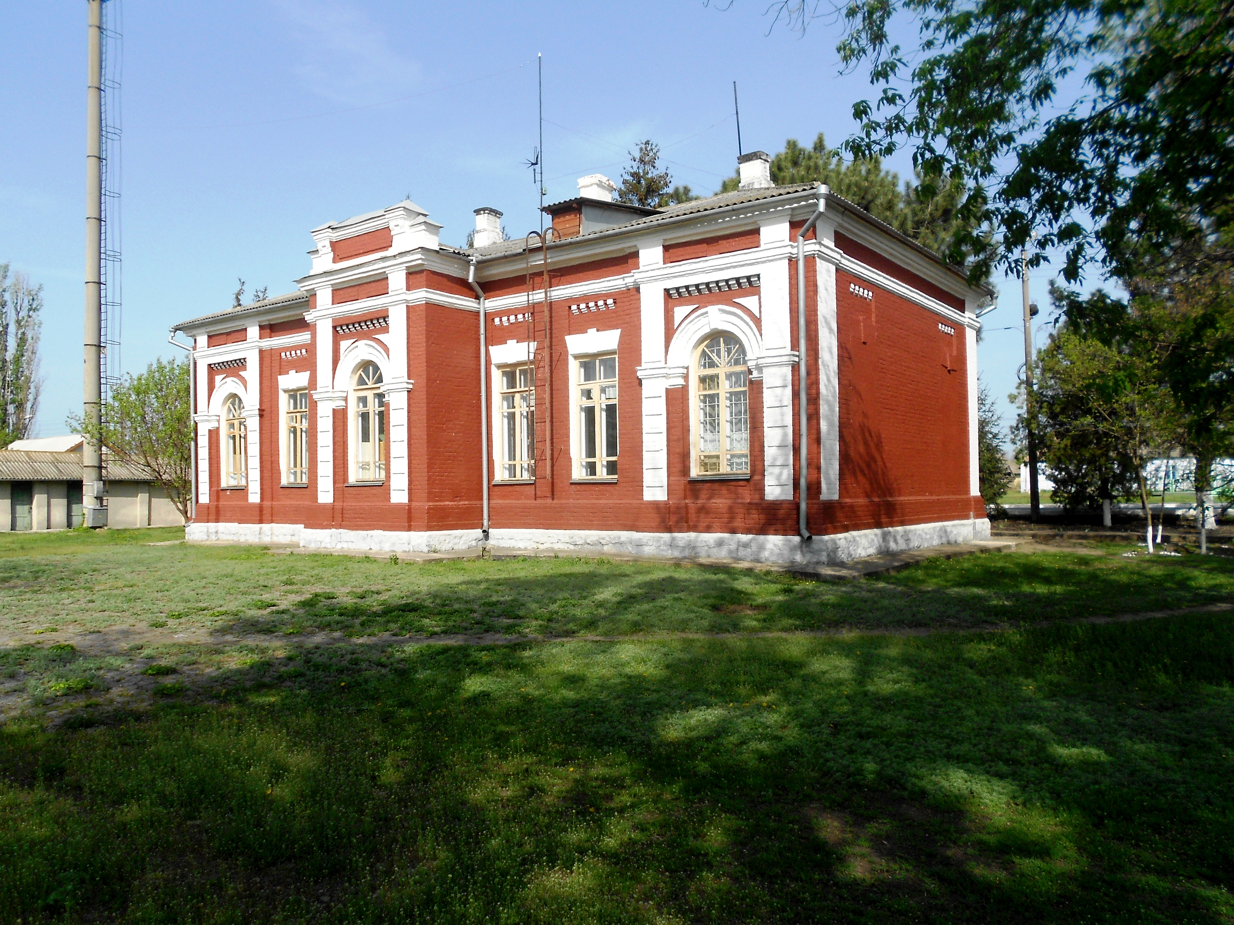 Gara Mărculești, raionul Florești, RM